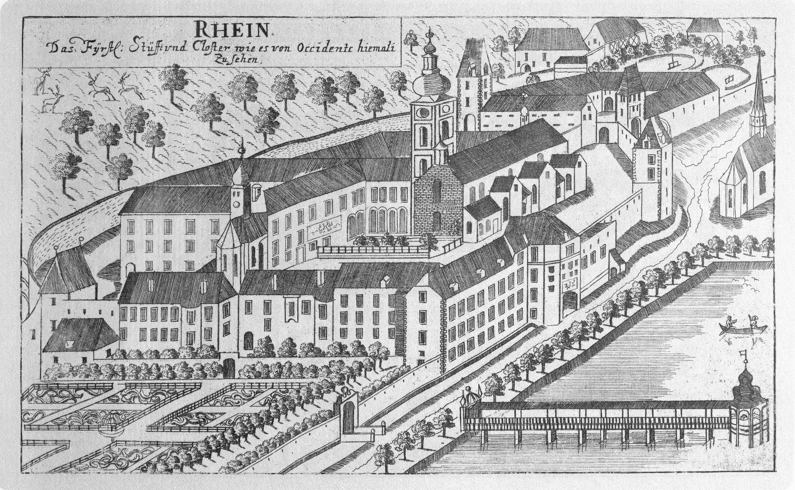 Stich des Stiftes Rein aus dem Jahr 1681. Blick aus Richtung Osten G. M. Vischers Käyserlichen Geographi, Topographia Ducatus Stiriae, Das ist: Eigentliche Delineation / und Abbildung aller Städte / Schlösser / Marcktfleck / Lustgärten / Probsteyen / Stiffter / Clöster und Kirchen / so es sich im Herzogthumb Steyrmarck befinden; Und anjetzo Umb einen billichen Preyß zu finden seynd Bey Johann Bitsch Universitäts Buchhandlern / Auff dem Juden=Platz bey der guldenen Saulen. Graz 1681 Die Nummerierung der Dateien folgt der alphabetischen Reihung der Ortsnamen und entspricht nicht dem Vischer-Register